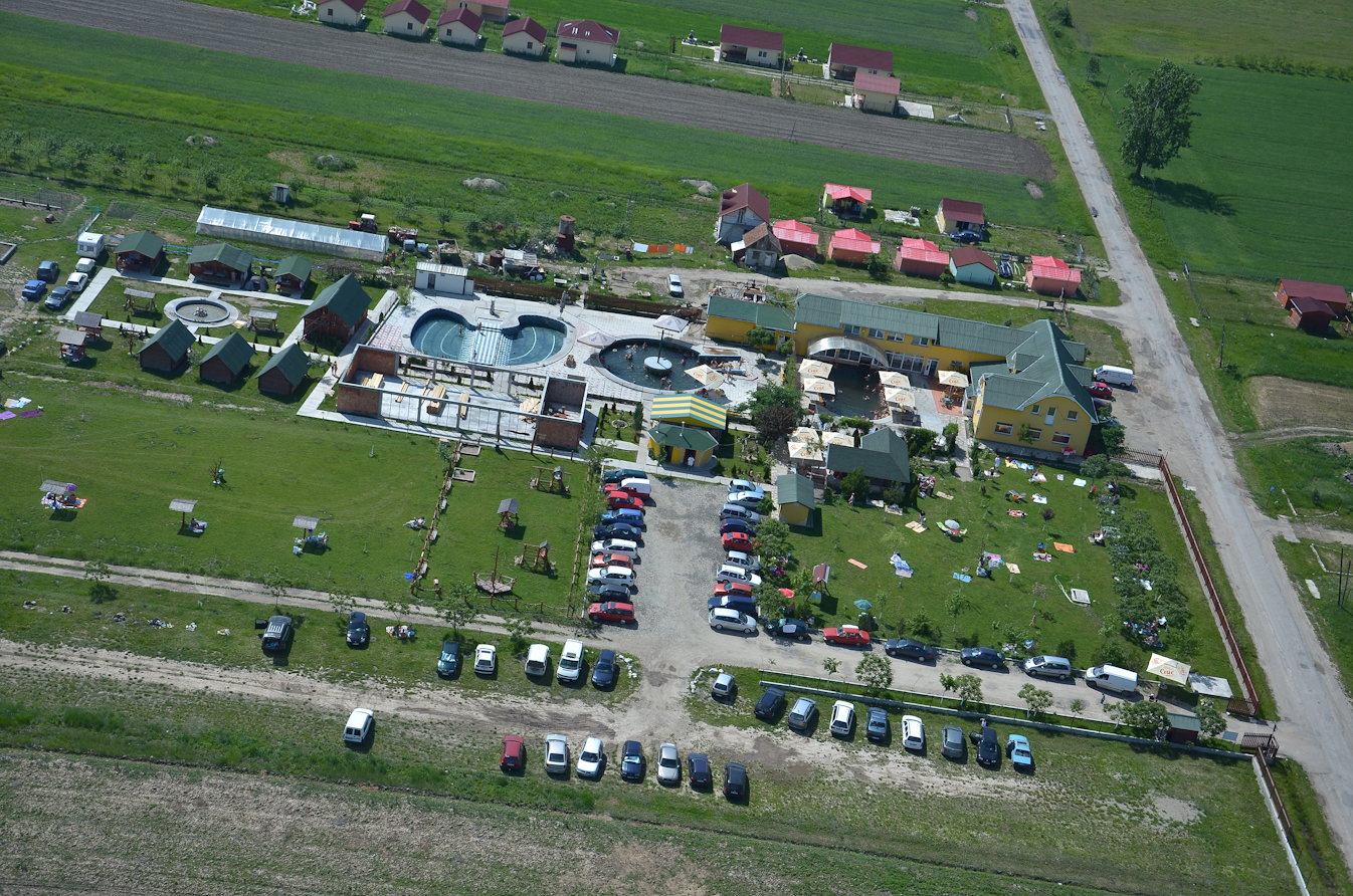 Strand Mihaieni